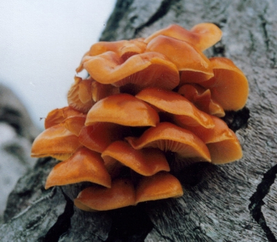 Flammulina velutipes